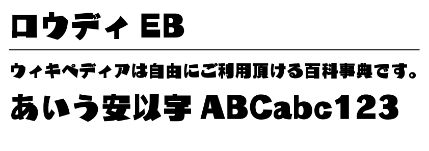 ロウディ EB サンプル